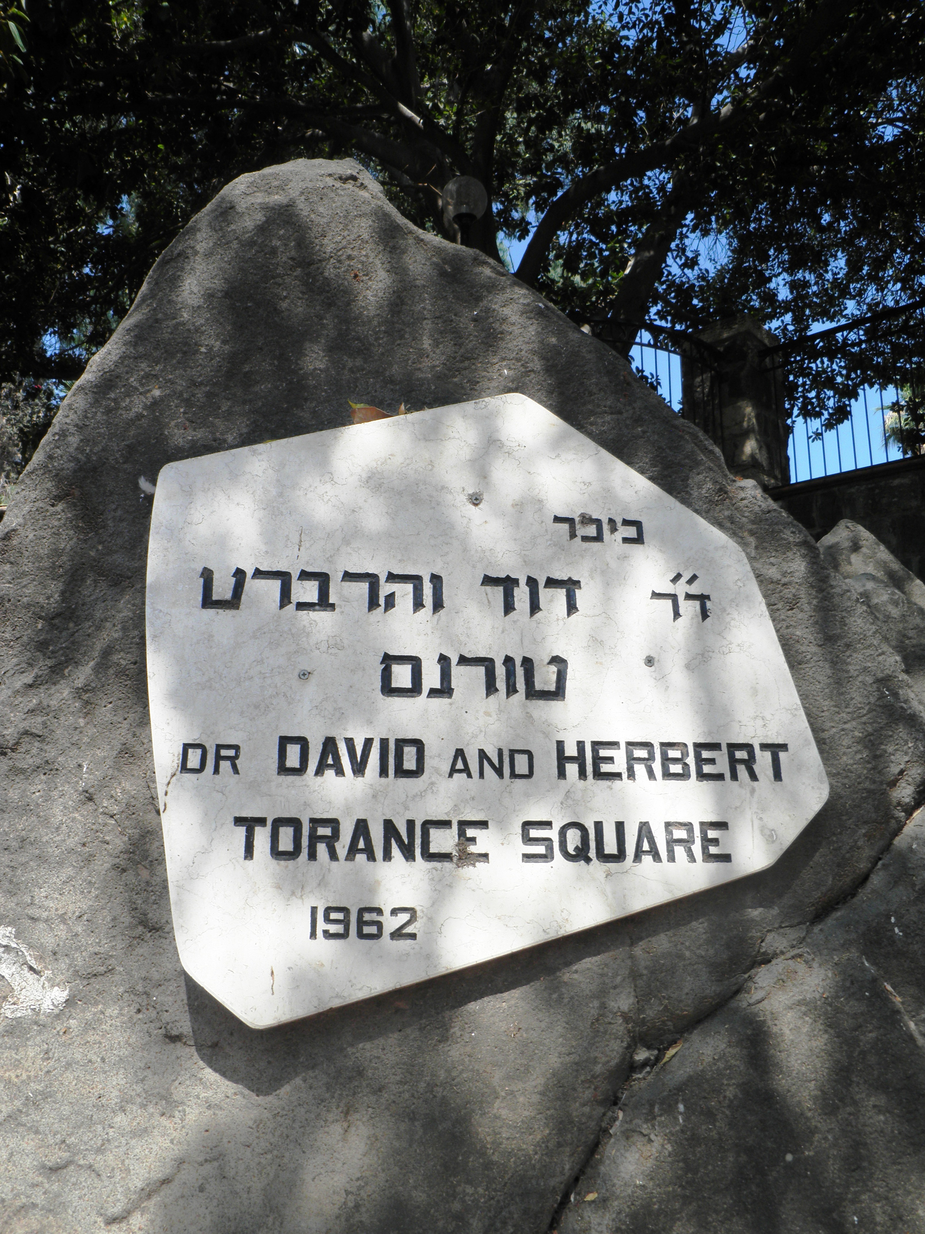 כיכר דייויד והרברט טוראנס